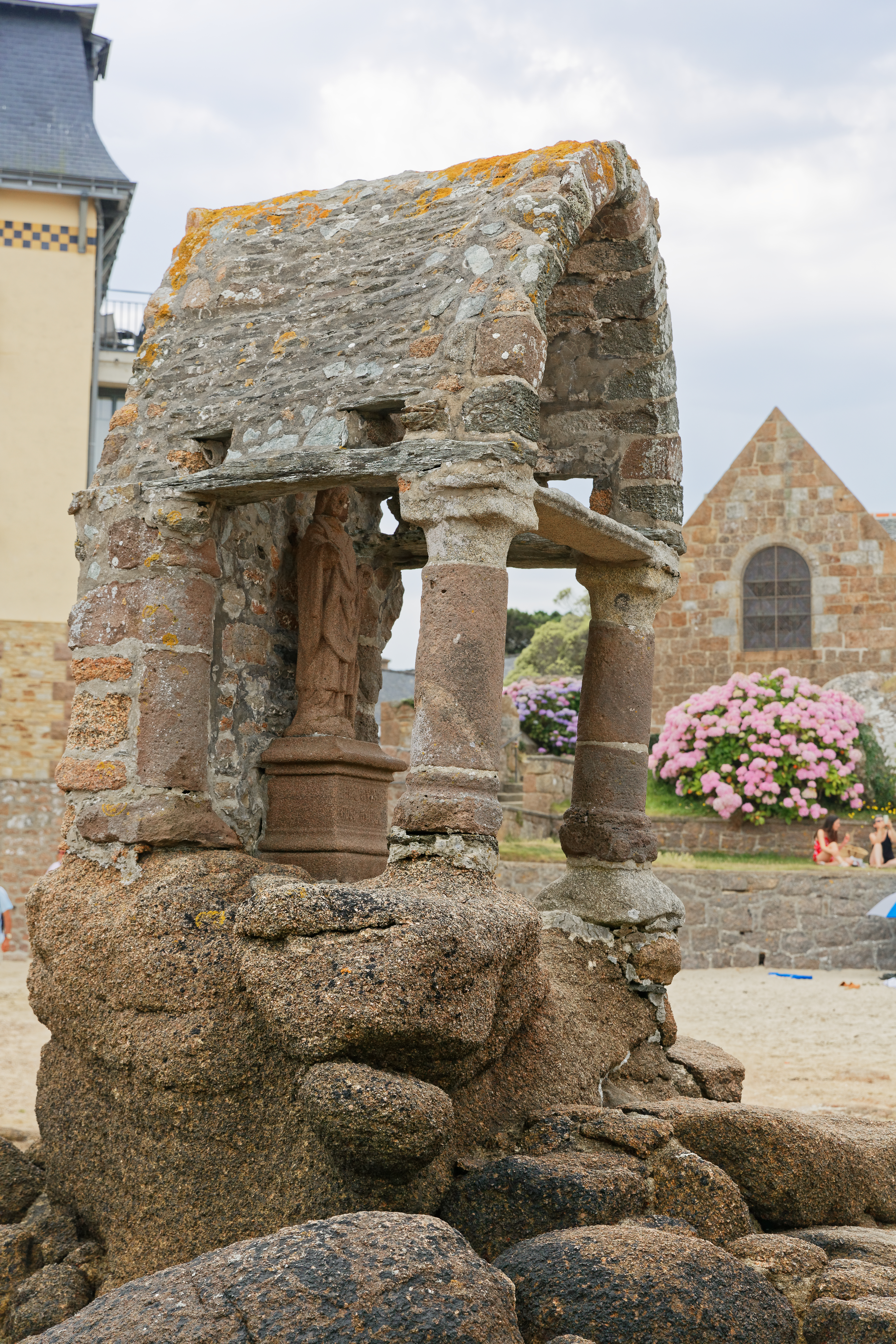 La côte de granite rose dans les Côtes d'Armor en suivant le chemin suivant